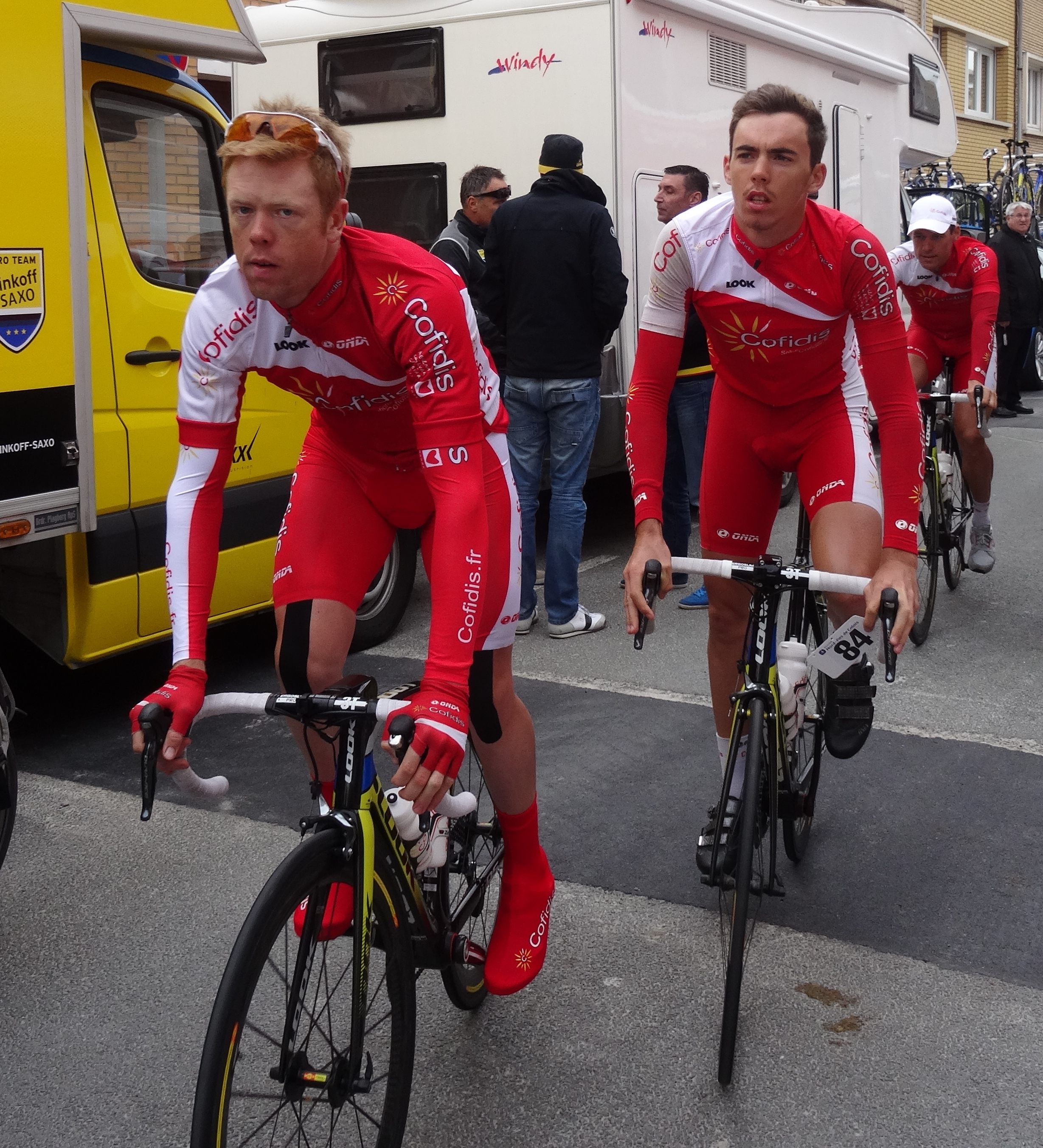 Reportage photographique réalisé le dimanche 11 mai 2014 au départ de la cinquième et dernière étape de l'édition 2014 des Quatre jours de Dunkerque à Saint-Pol-sur-Mer, Nord, Nord-Pas-de-Calais, France. Depicted people: Romain Zingle, Christophe Laporte and Stéphane Poulhiès Depicted team: Cofidis